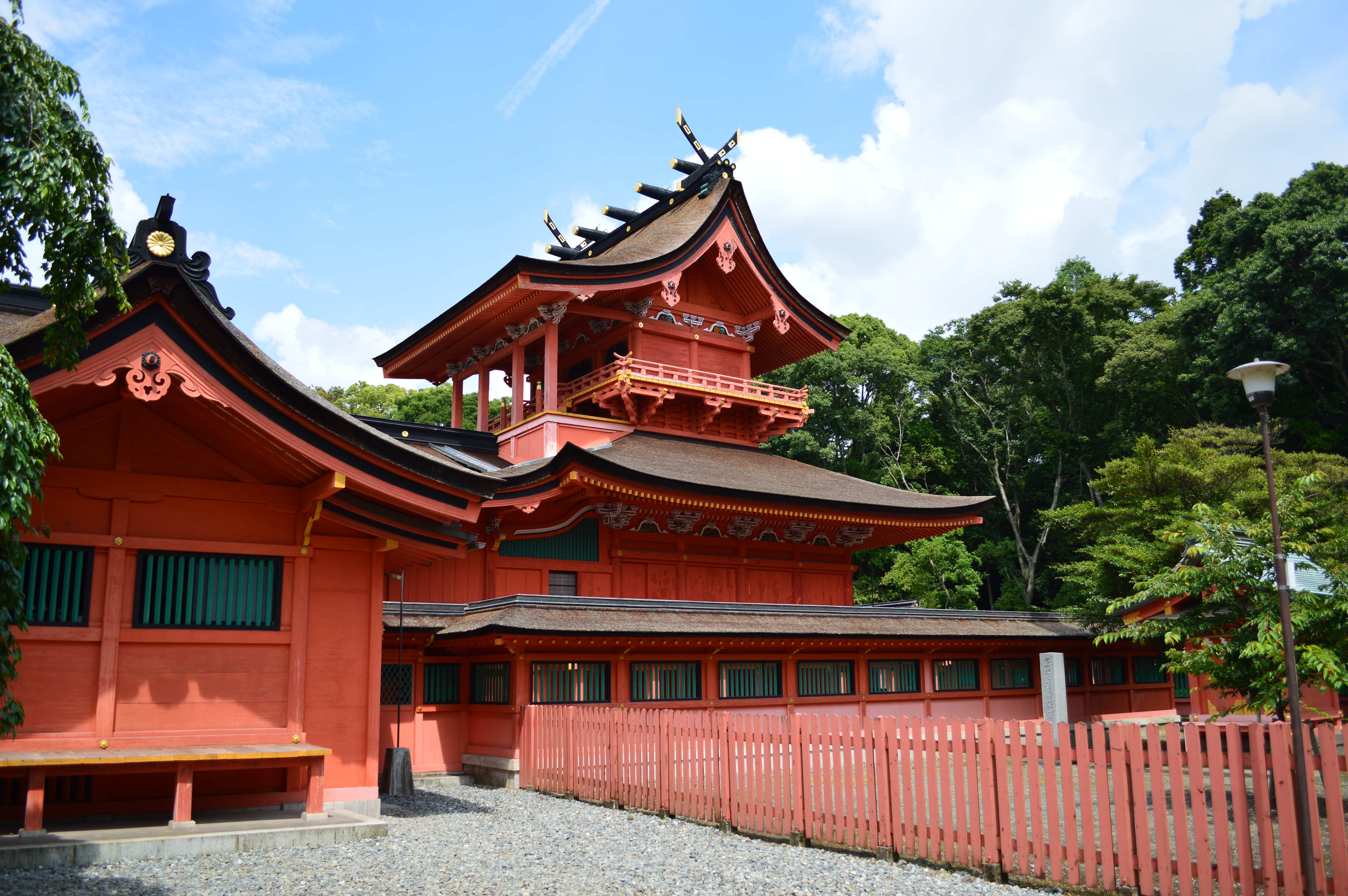 富士山本宮浅間大社 本殿